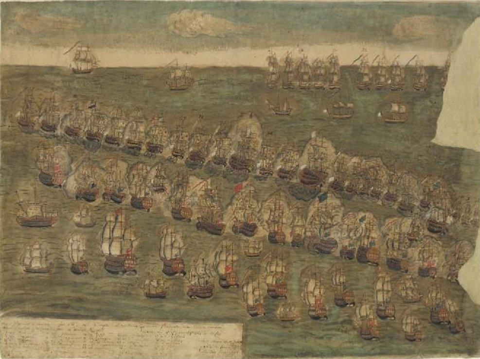 Combat naval d'Ouessant, probablement celui de 1781 (auteur inconnu, dessin à l'aquarelle, BNF